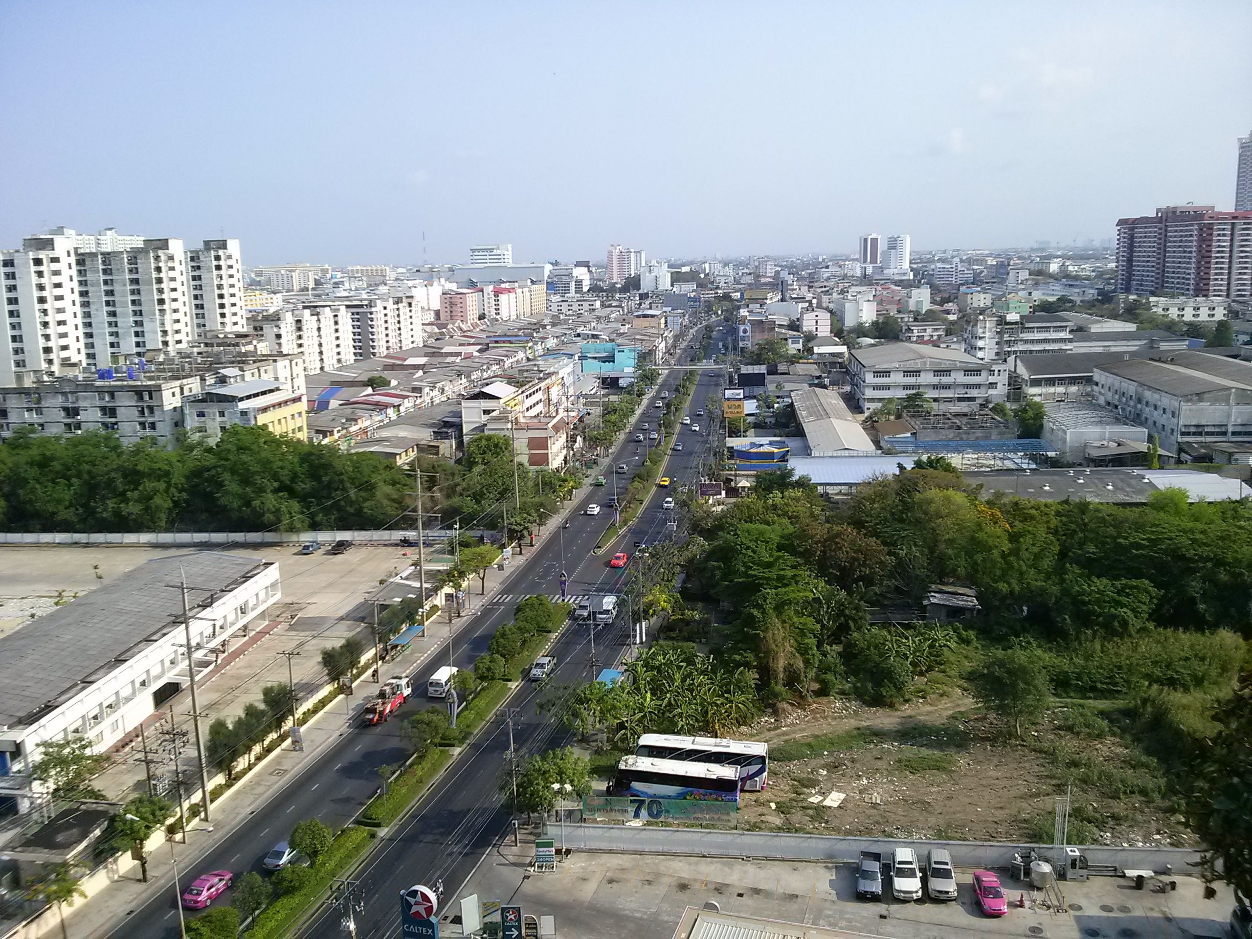 Hua Mak, Bang Kapi, Bangkok 10240, Thailand